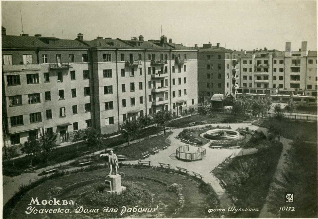 Открытка "Москва. Усачёвка. Дома для рабочих"